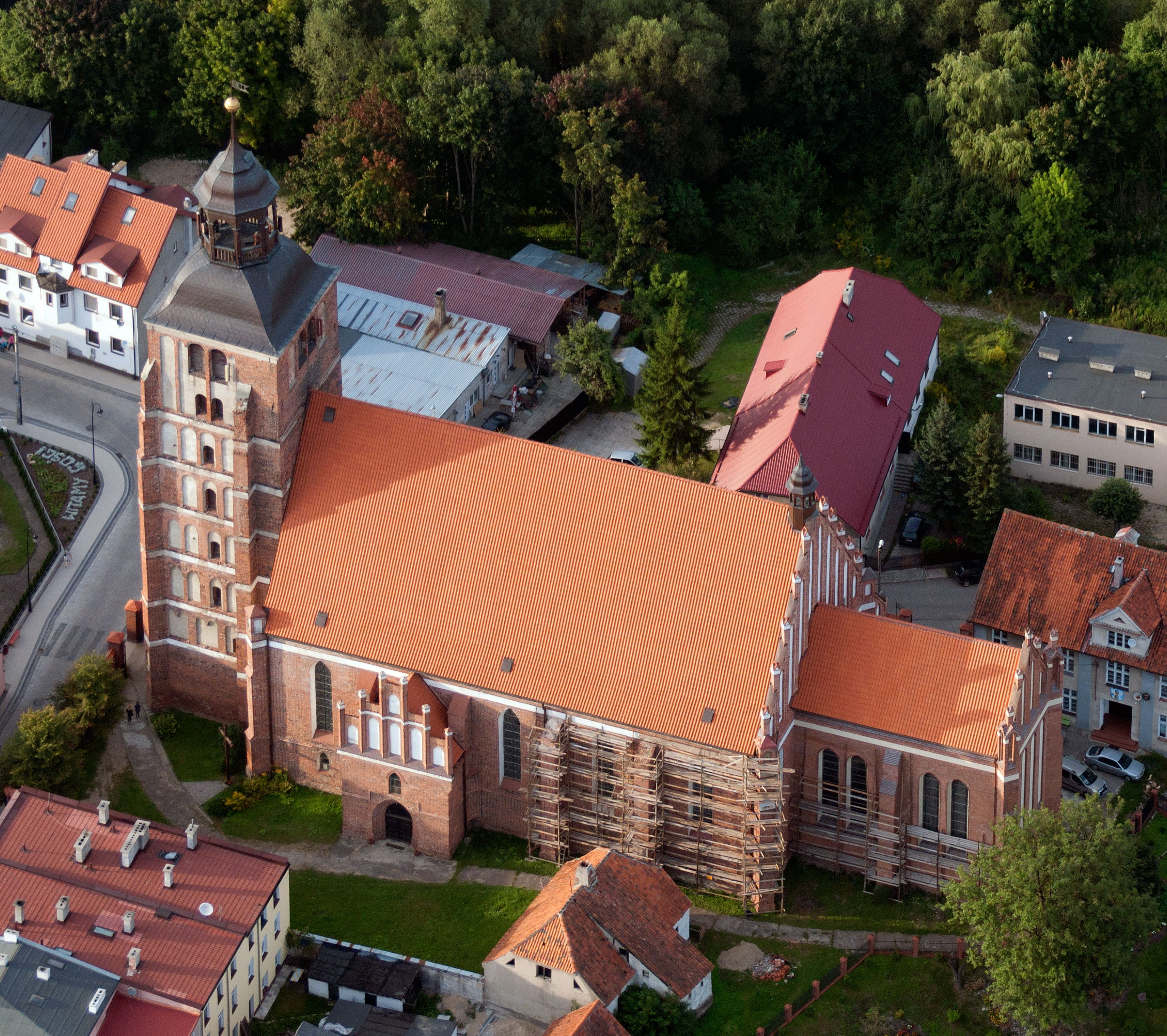 Barczewo - rzymskokatolicki kościół parafialny p.w. św. Anny, 4 ćw. XIV, XVI, 2 poł. XVIII, 1894